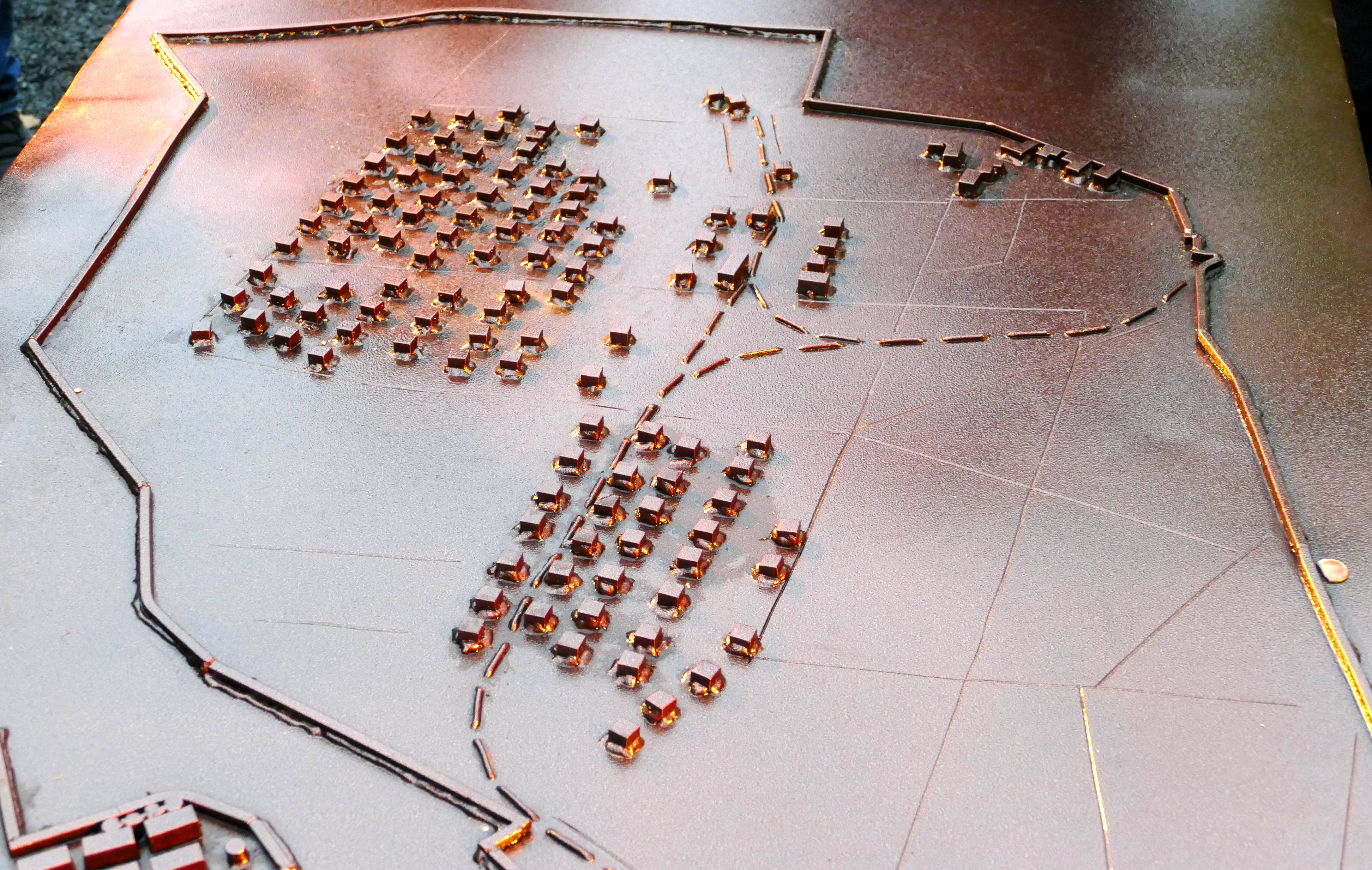 Mahnmal am Eingang zur Muna Lübberstedt, eingeweiht am 9. November 2019